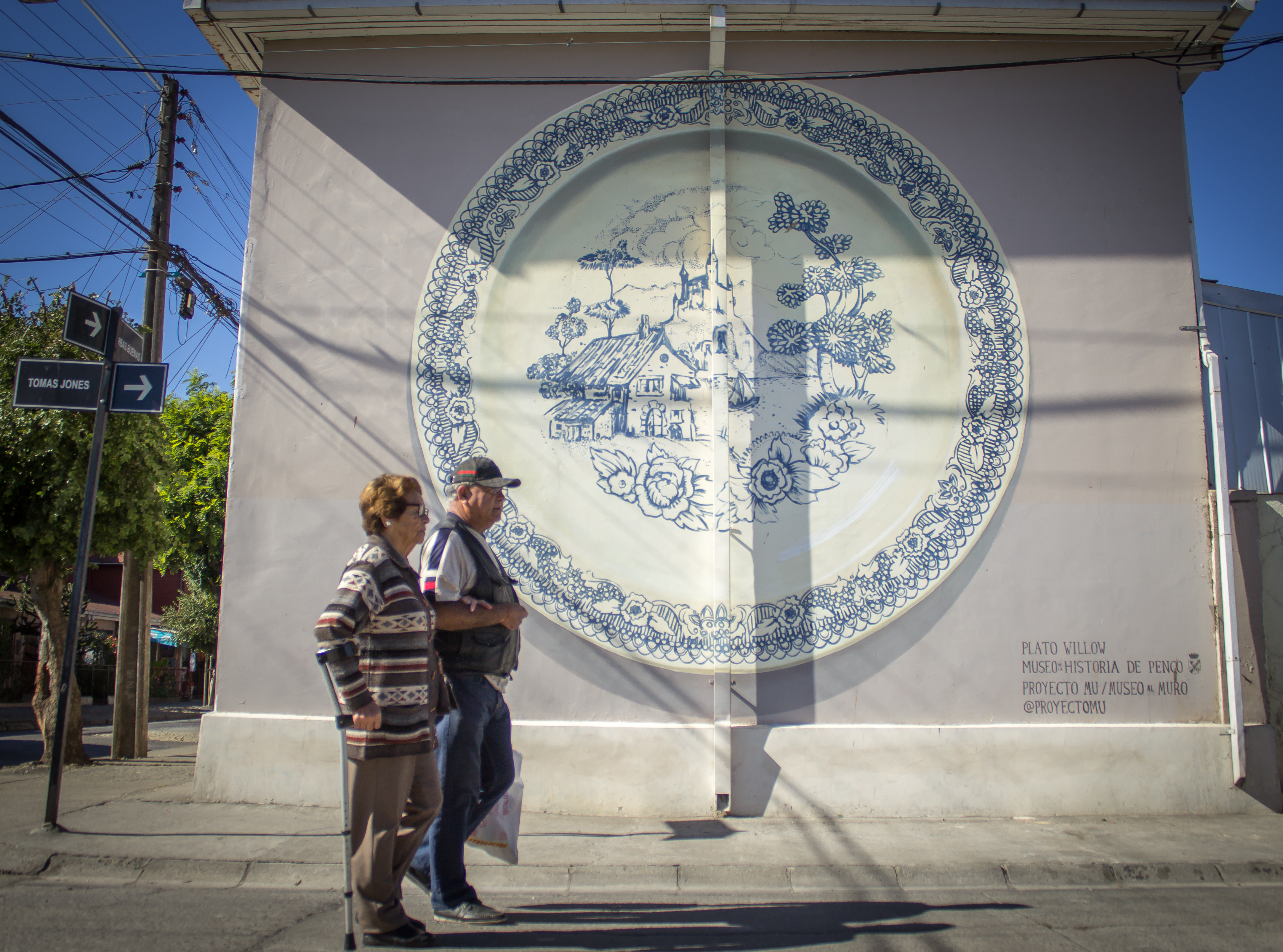 Mural del Plato Willow, en la población facundo Díaz.